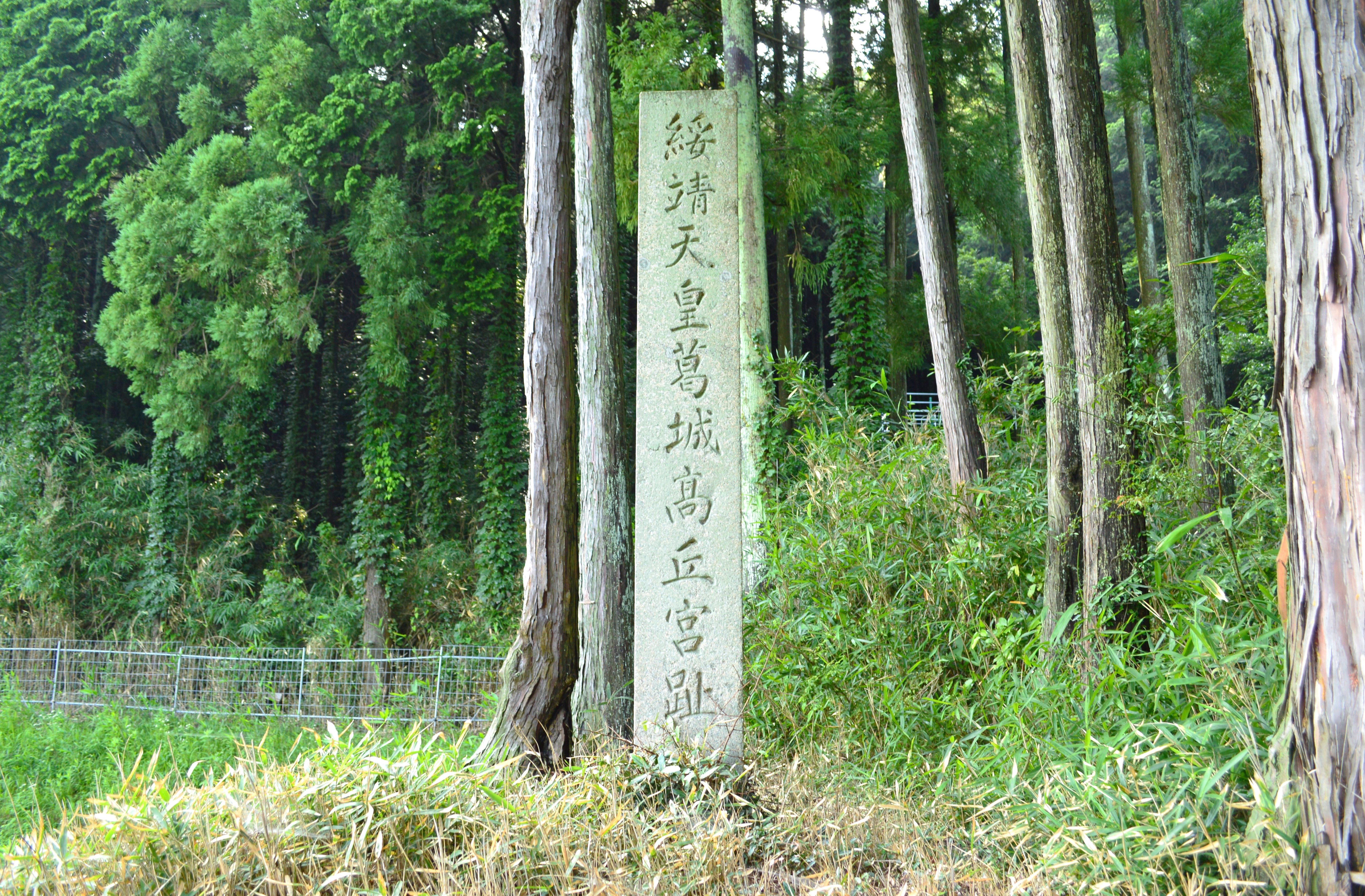 綏靖天皇葛城高丘宮阯碑